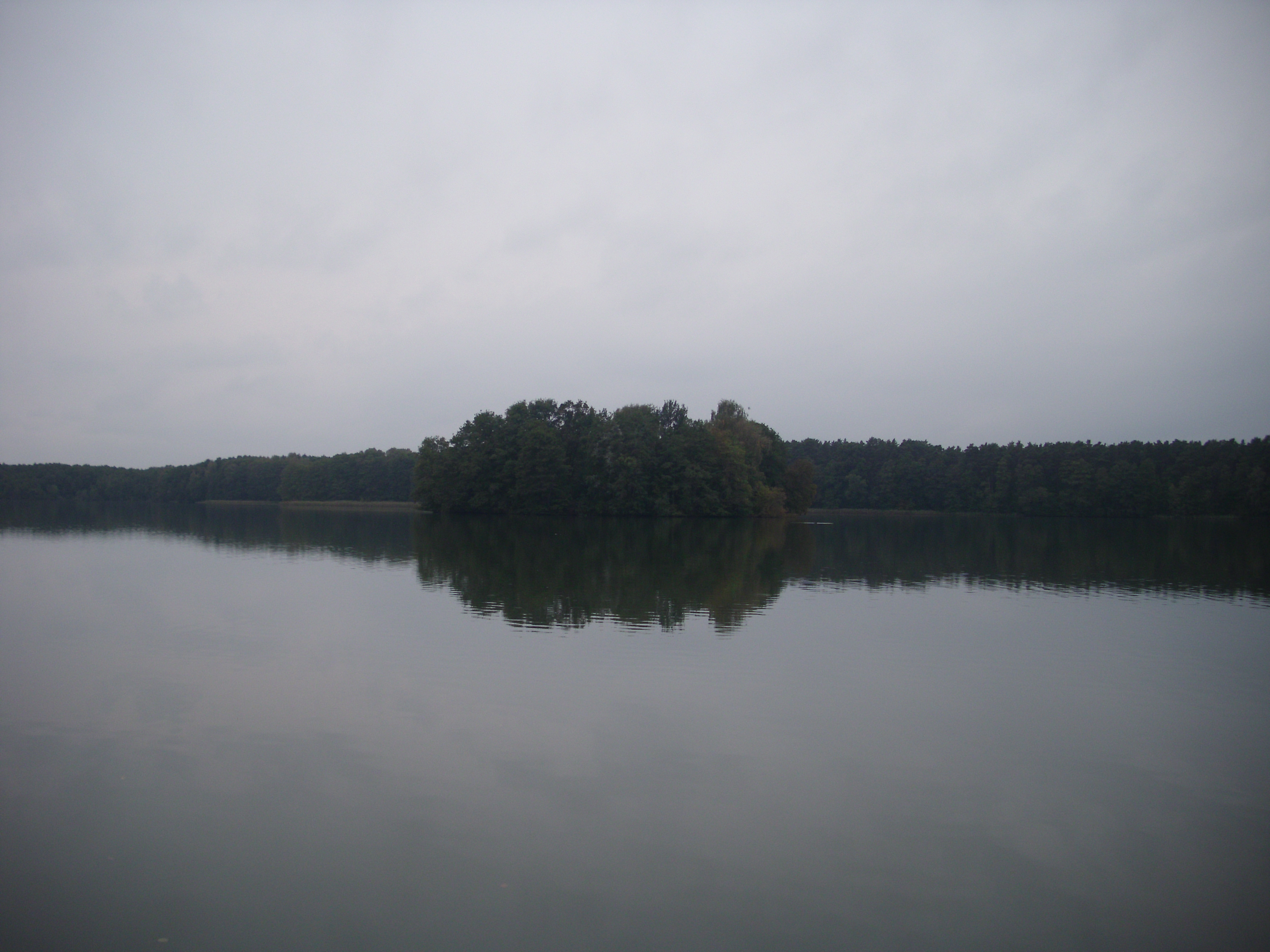 Großer Müllroser See mit Fischerwerdel, Müllrose, Brandenburg, Naturpark Schlaubetal